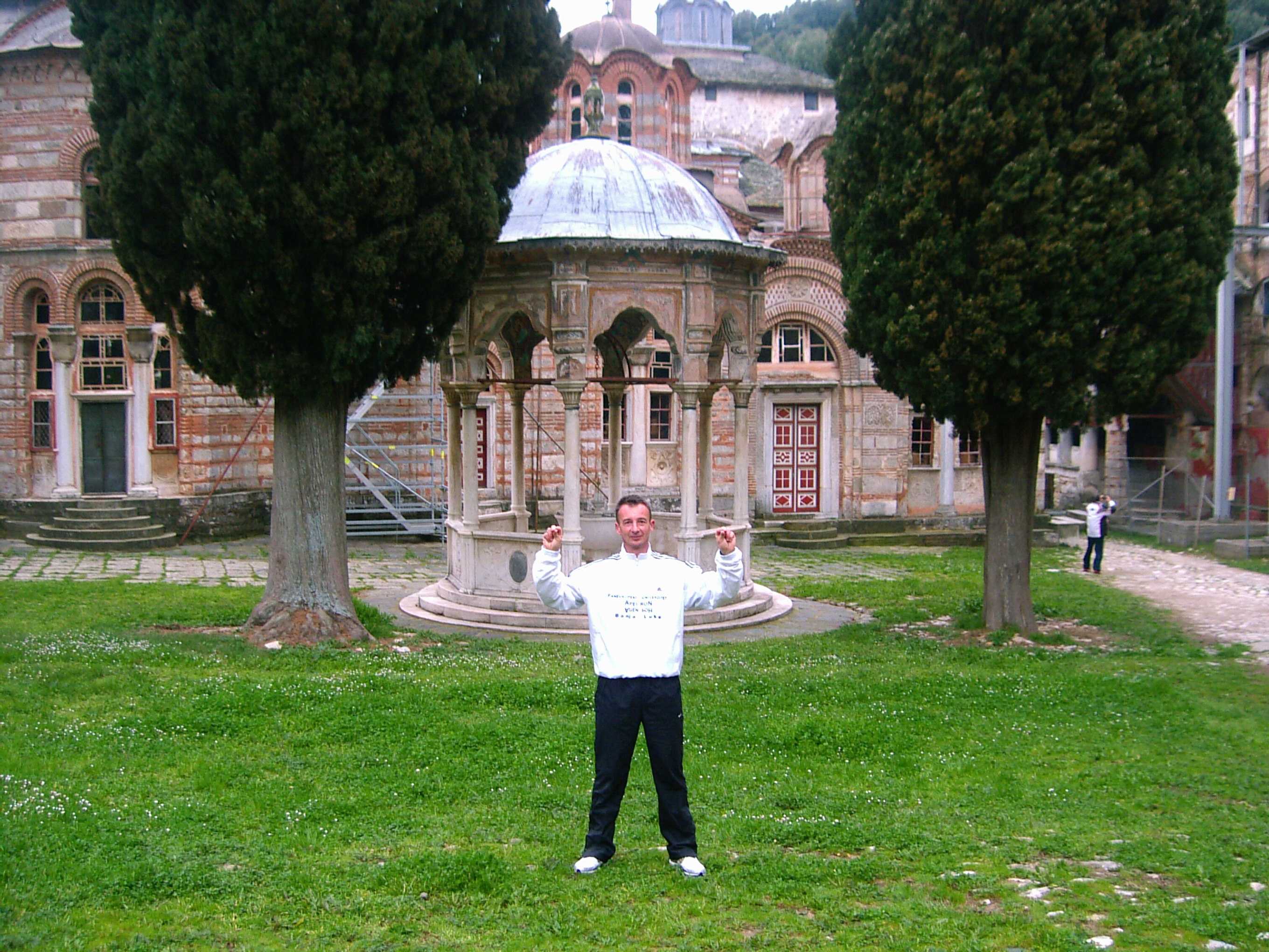 Ултрамаратонац Жељко Благојевић Чак код манастира Хиландар